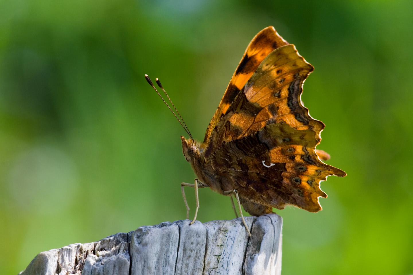 Polygonia c-album